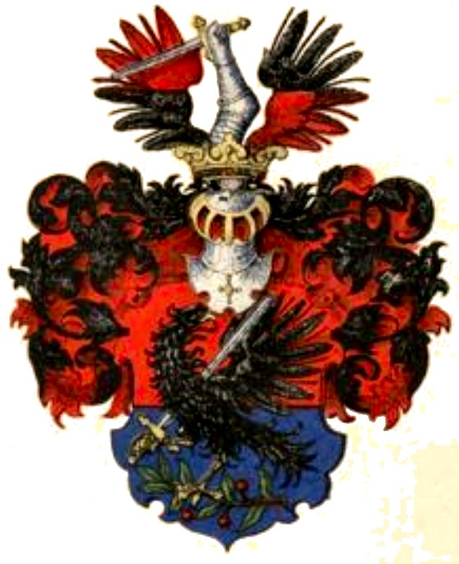 Wappen derer von Ampach